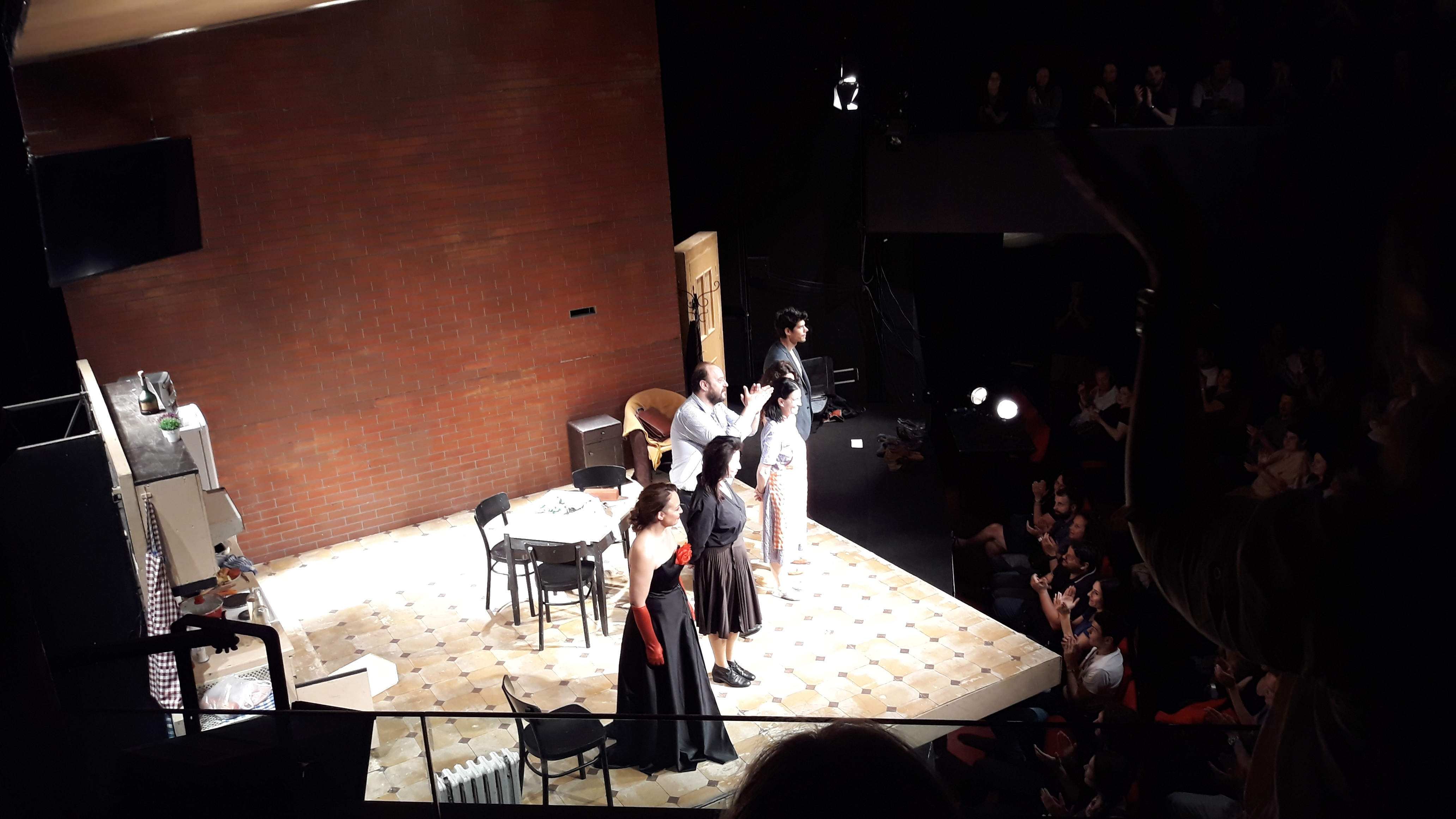 Представа Балкански шпијун у Народном позоришту у Београду